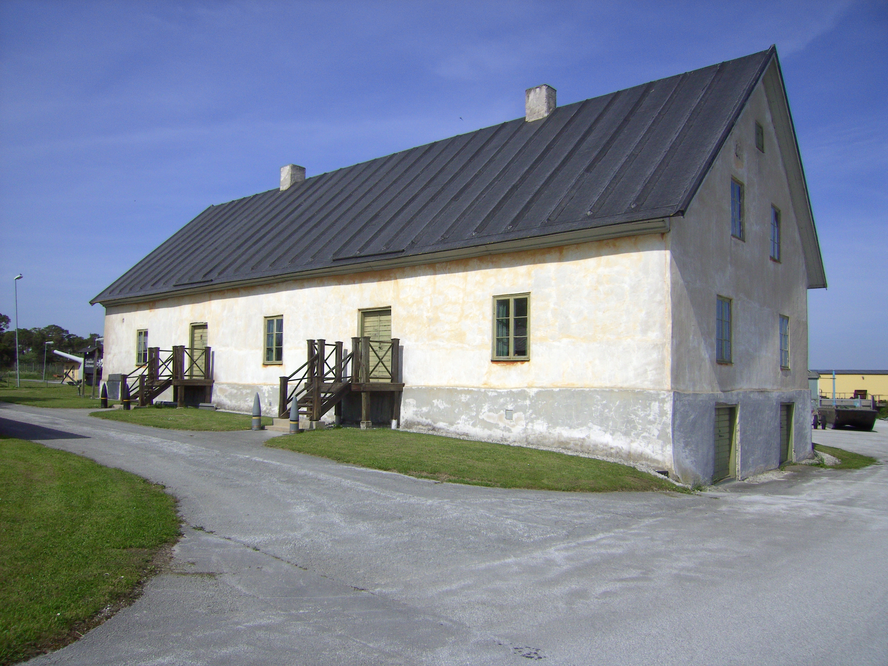 Franska kasernen vid KA 3. Numera museum.